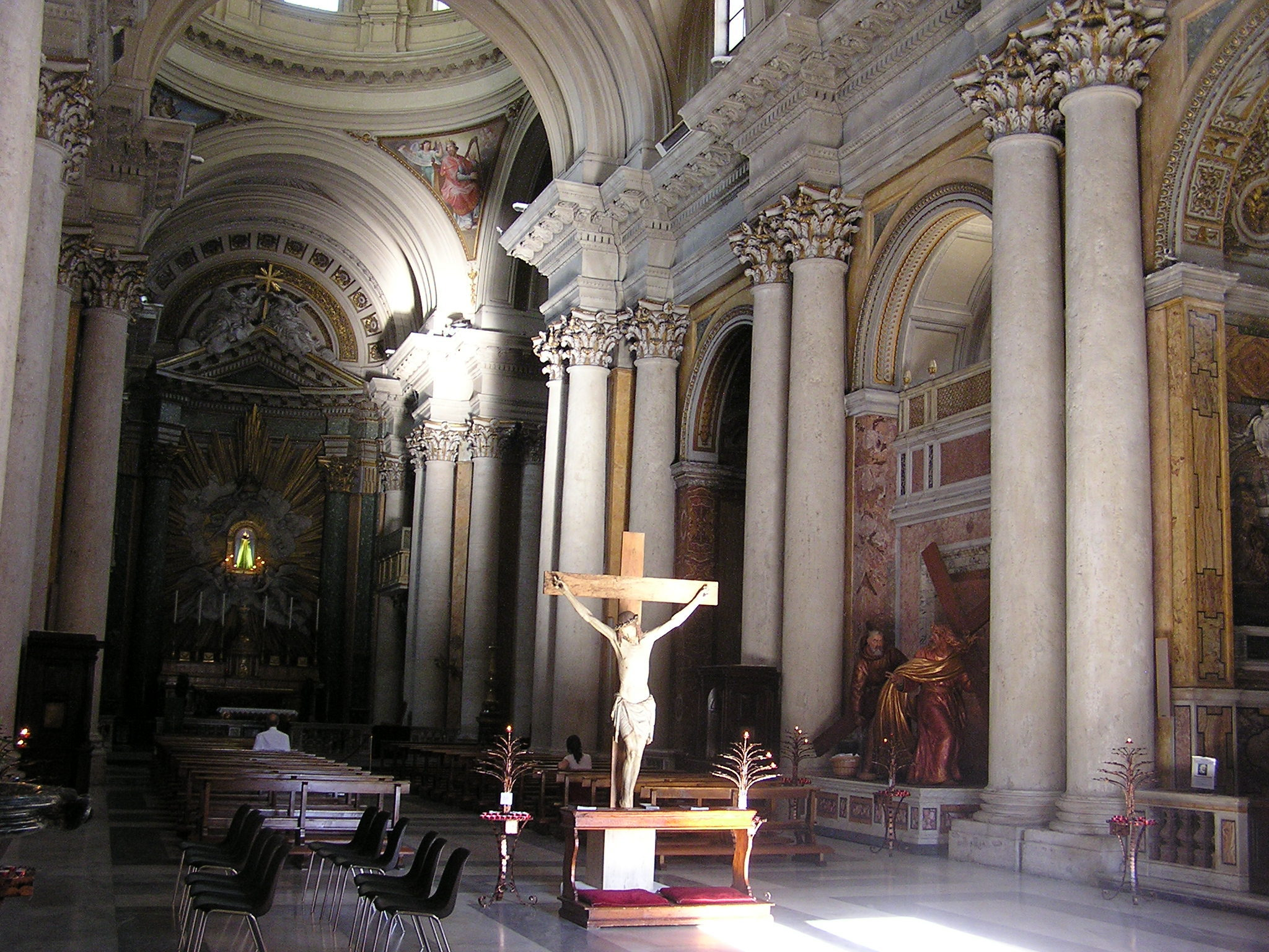 Sono io l'autore della foto e la cedo in pubblico dominio rinunciando a tutti i diritti. La foto rappresenta l'interno della Chiesa di S. Salvatore in Lauro a Roma.